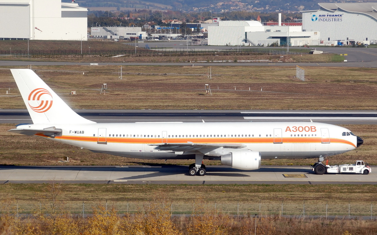 Photo prise à l'aéroport de Toulouse-Blagnac (LFBO) en France. Picture take at Toulouse-Blagnac Airport (LFBO) in France.